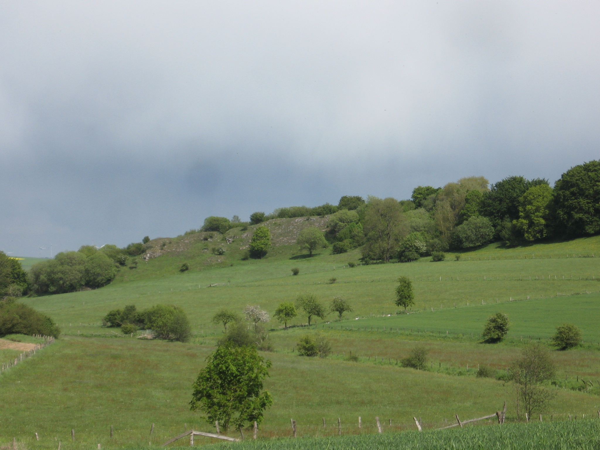 Östliche Bereich der Bergkuppe Großer Blumenstein im NSG Blumenstein mit Magerrasen. Im Bildvordergrund Teile des Landschaftsschutzgebietes Grünlandverbund Aa